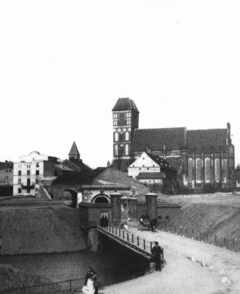 Brama św. Jakuba w Toruniu zburzona pod koniec XIX w.